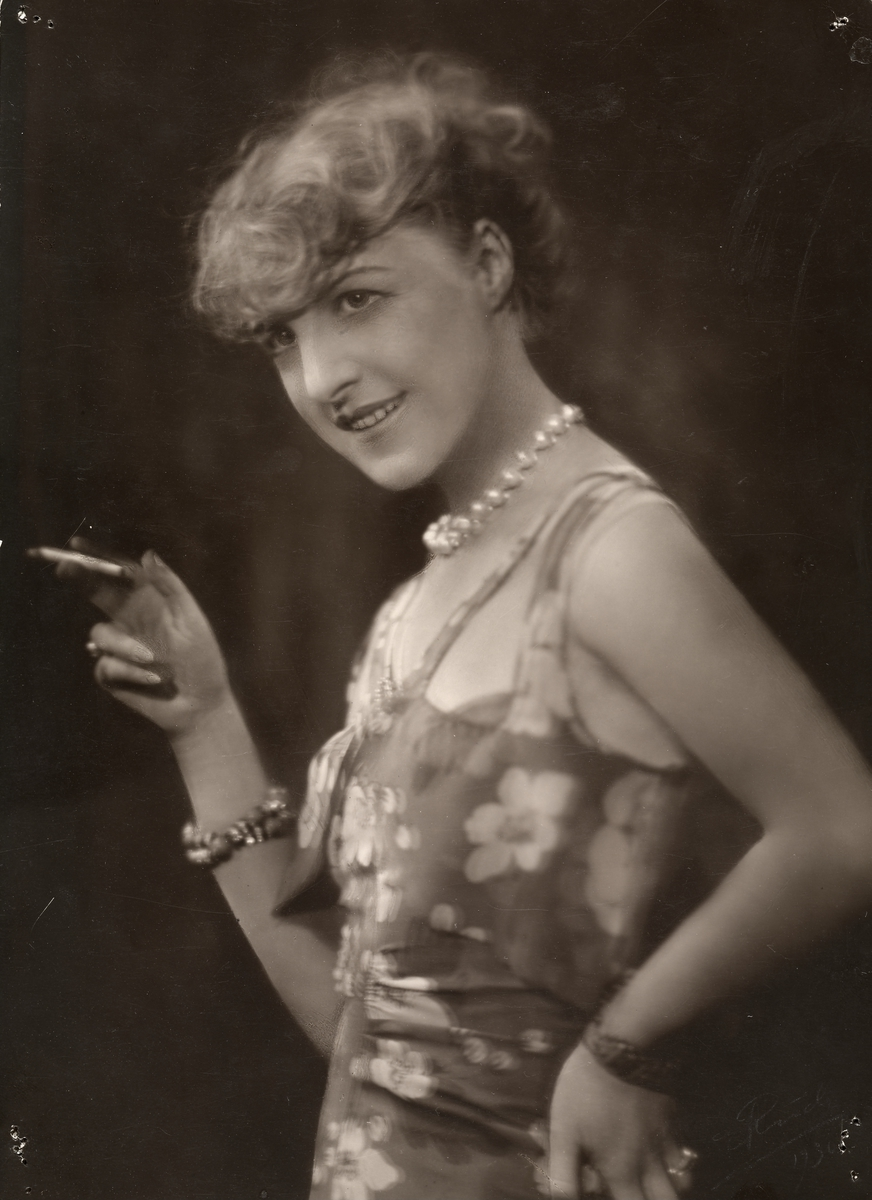 Rollebilde fra "Don Juan" på Det Nye Teater.